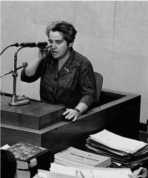 חולדה קמפניינו מעידה במשפט אייכמן, ירושלים, 1961